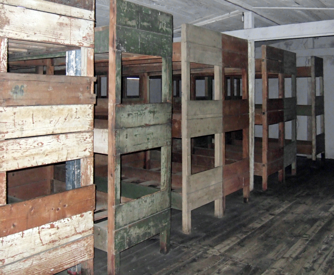 Unterkünfte für Gefangene im KZ Stutthof